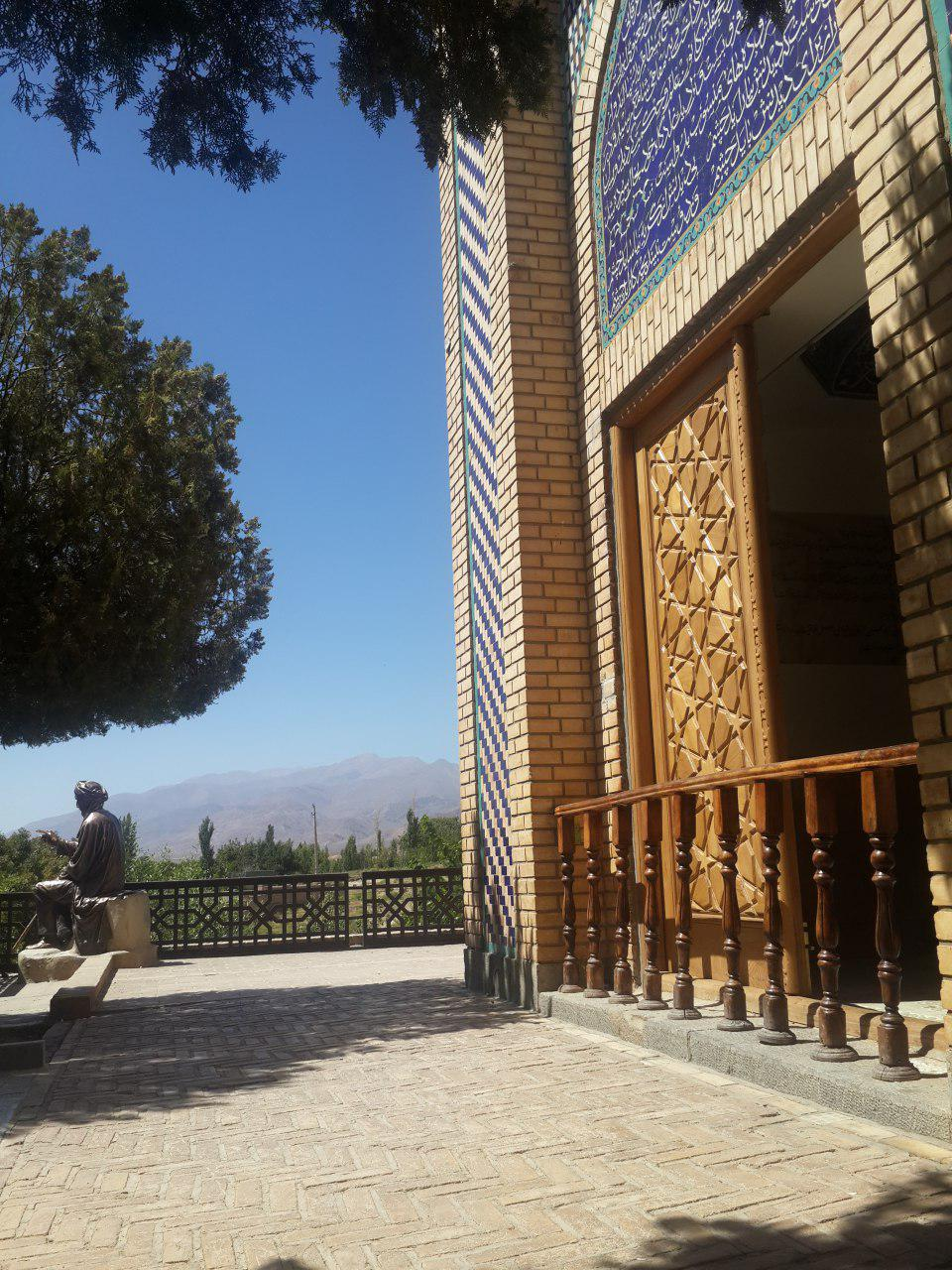 در ورودی آرامگاه